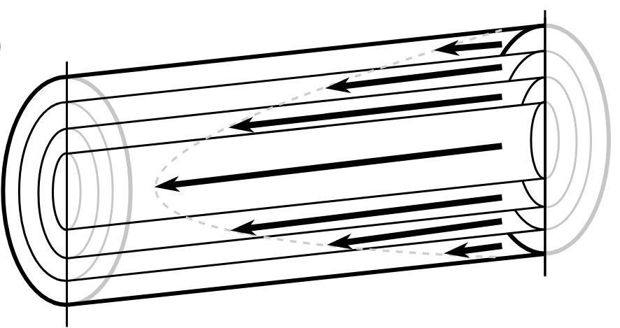 Hagen Poisseuille Flow